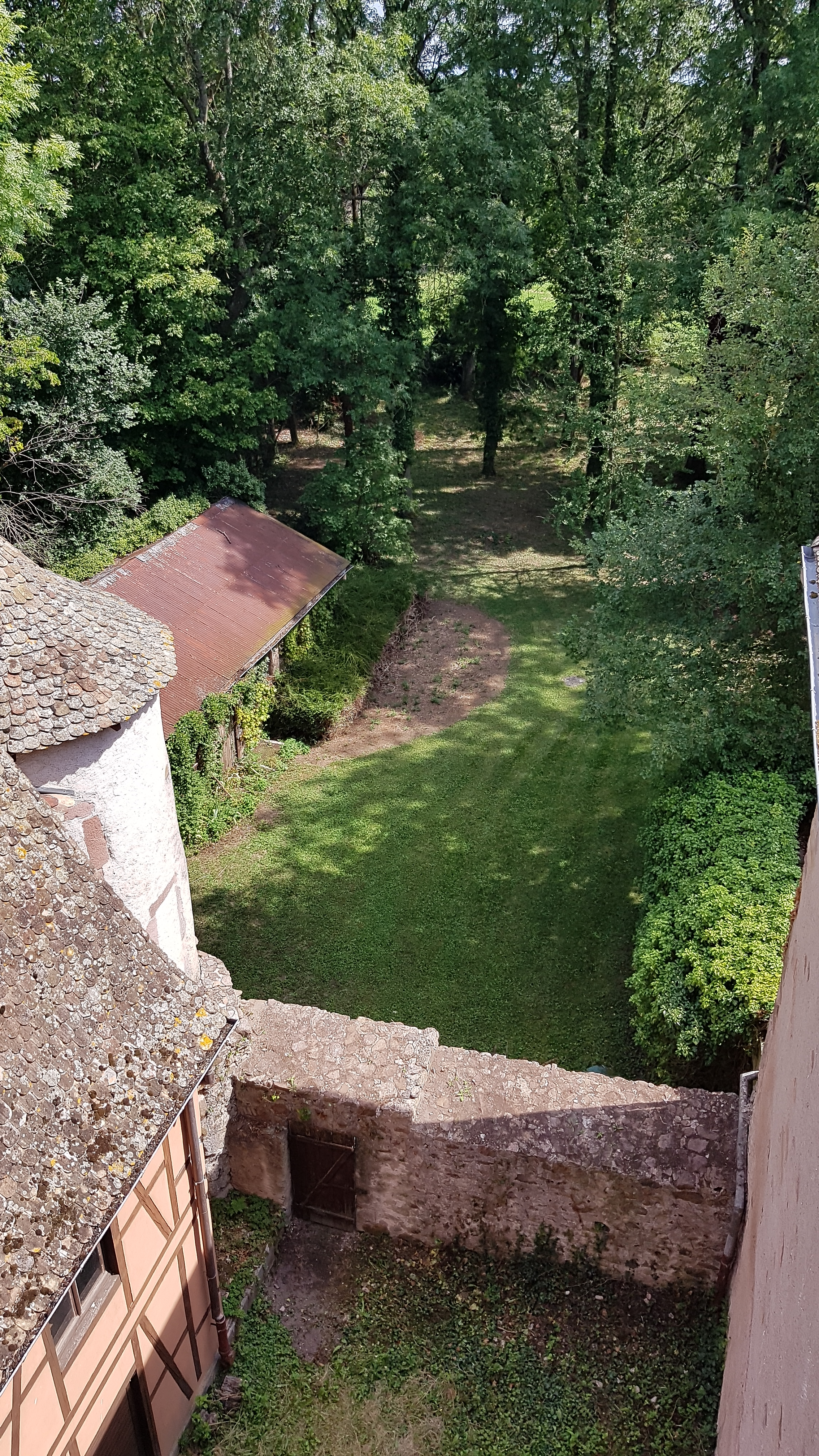 Le chemin de ronde photographié à partir du donjon ; la sortie murée est visible à gauche à la base de la tour en poivière !